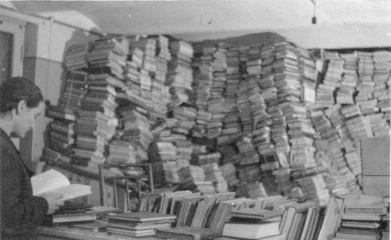 Riga - Dienststelle Bücherlager im Keller der Dienststelle November 1943 Film 109/7